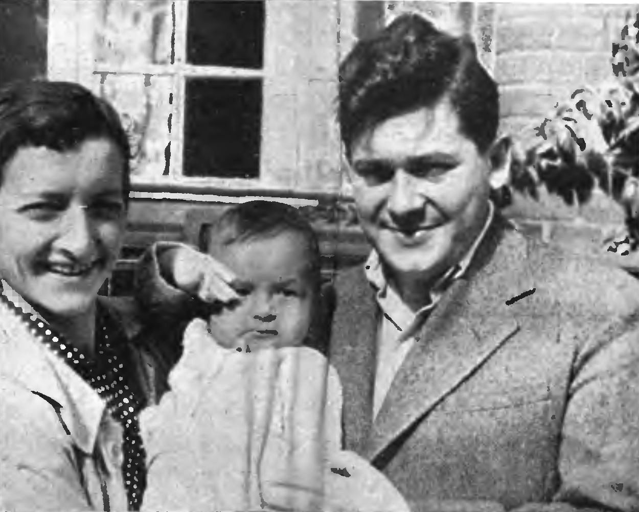 skan czasopisma PL, Wiadomości Literackie 5 XII 1937 nr 50 (736) Numer specjalny poświęcony Zbigniewowi Uniłowskiemu